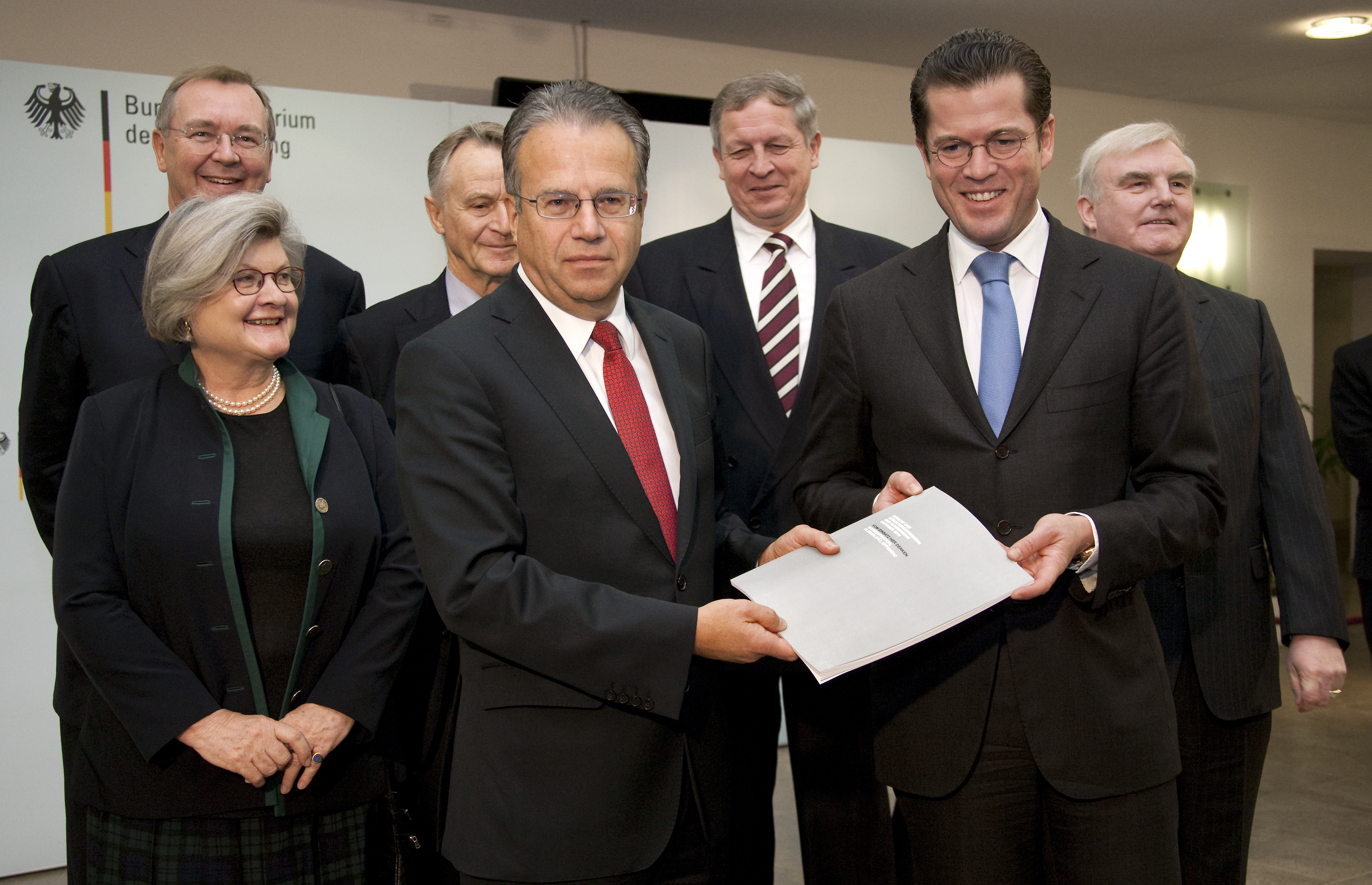 Dem Bundesminister der Verteidigung Karl-Theodor zu Guttenberg wird der Abschlussbericht der Strukturkommission durch den Leiter der Strukturkommission Frank-Jürgen Weise im Beisein der übrigen Kommissionsmitglieder übergeben. Foto: Bundeswehr/Bienert